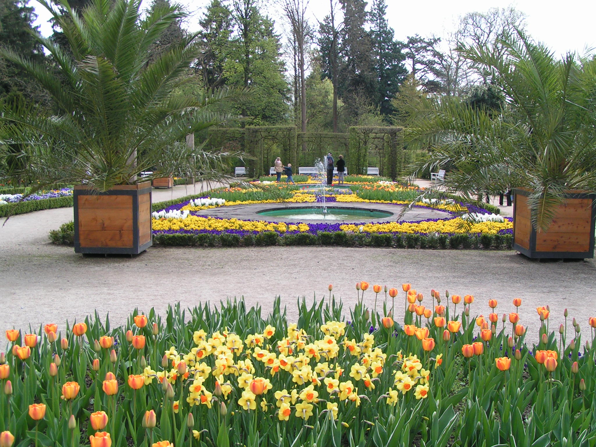 Palmengarten im Kurpark Bad Pyrmont